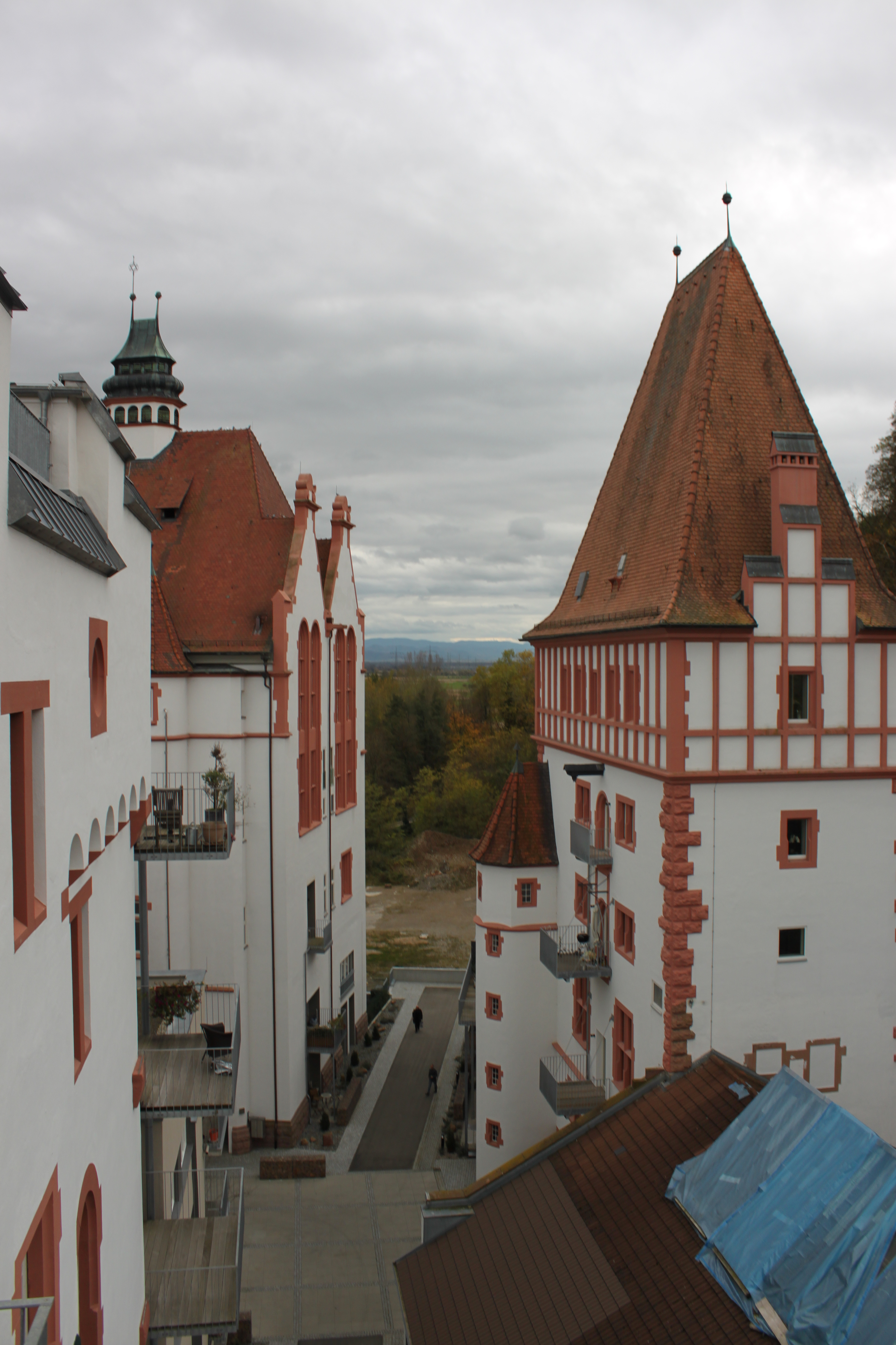 Riegeler Brauerei - heute Riegeler Lofts - Blick in die sogenannte Brauereigasse - rechts Süßwasserturm